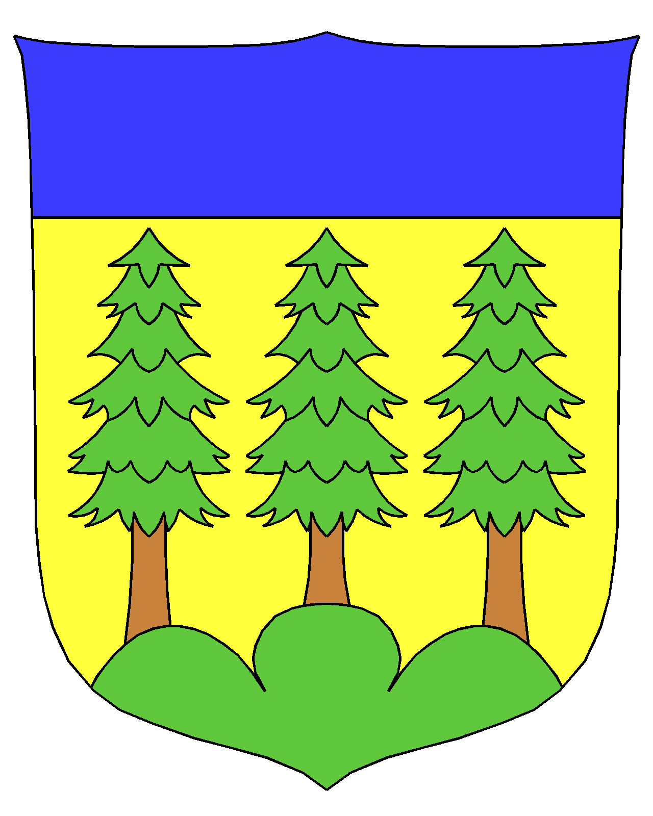 Das Wappen der Gemeinde Niederwald